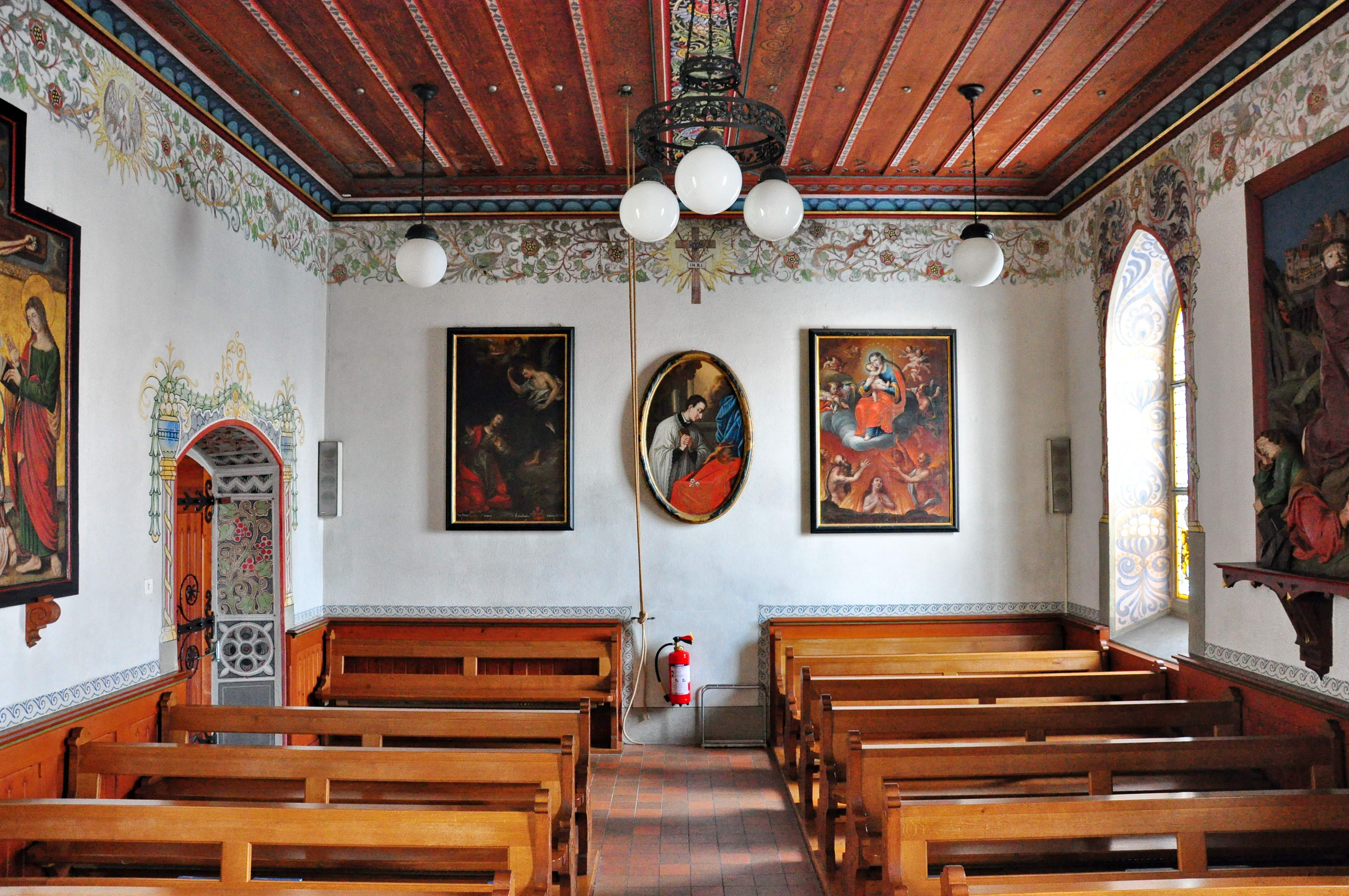 Liebfrauenkapelle in Rapperswil (Switzerland)